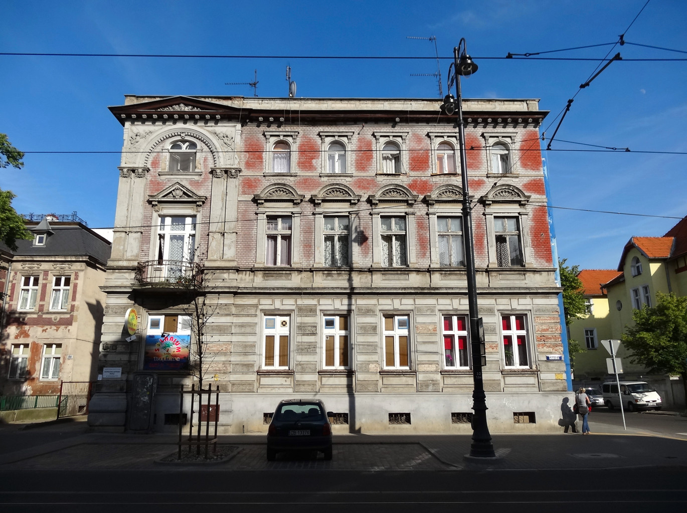 Dom przy ul. Gdańskiej 86 w Bydgoszczy (1887-1888, aut. Józef Święcicki)